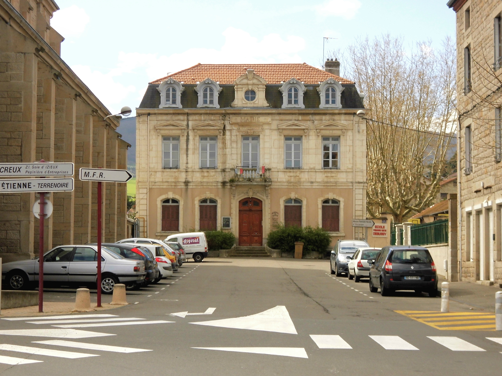 Izieux (Loire), aujourd'hui Saint-Chamond, ancienne mairie, 6 avril 2014